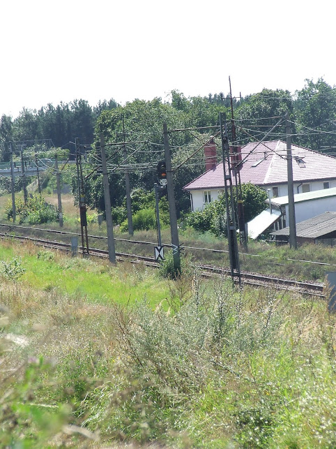 Linia 273 w Gryfinie